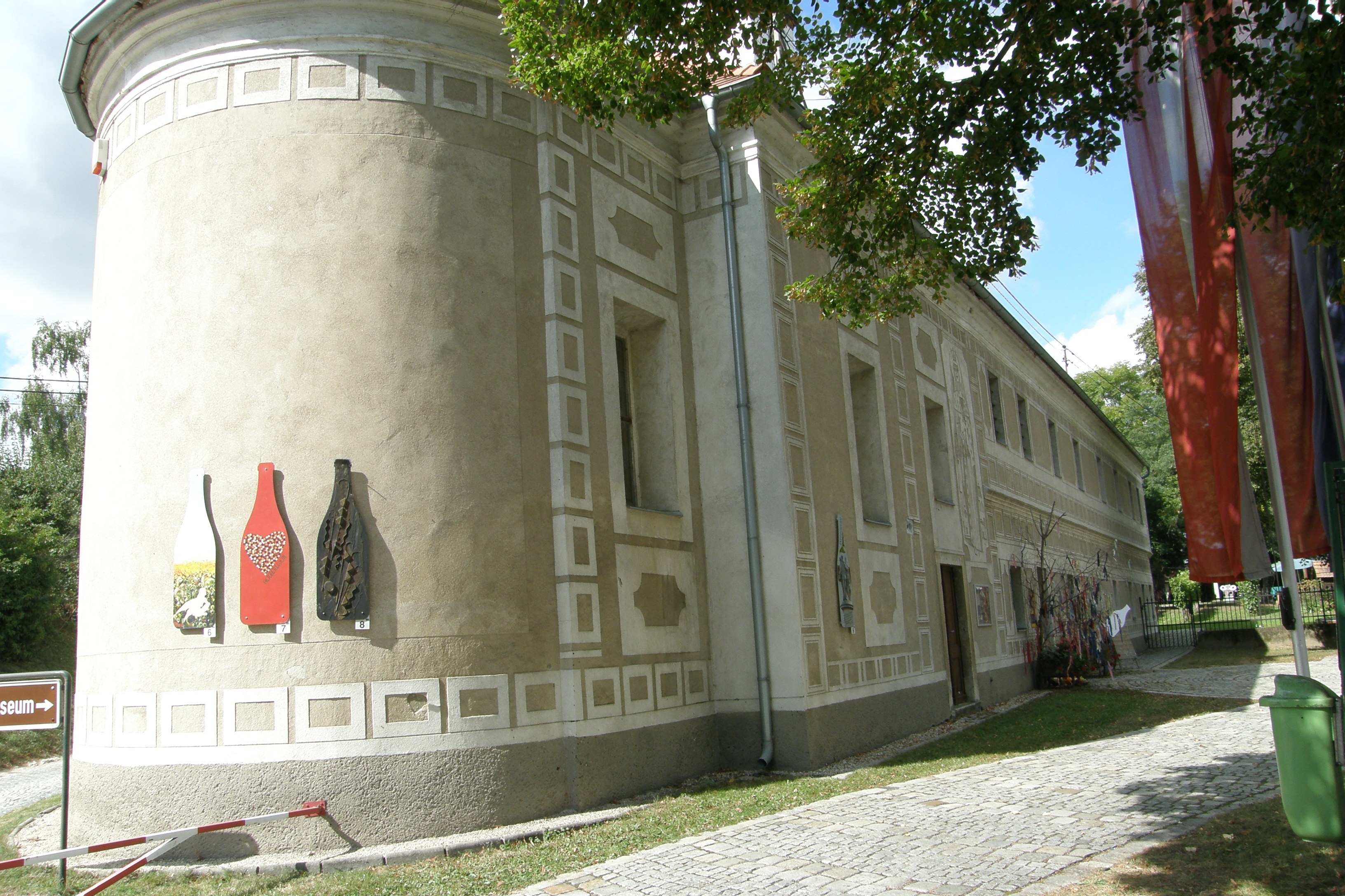 Stadtmuseum Poysdorf, ehem. Bürgerspital mit Barbarakapelle